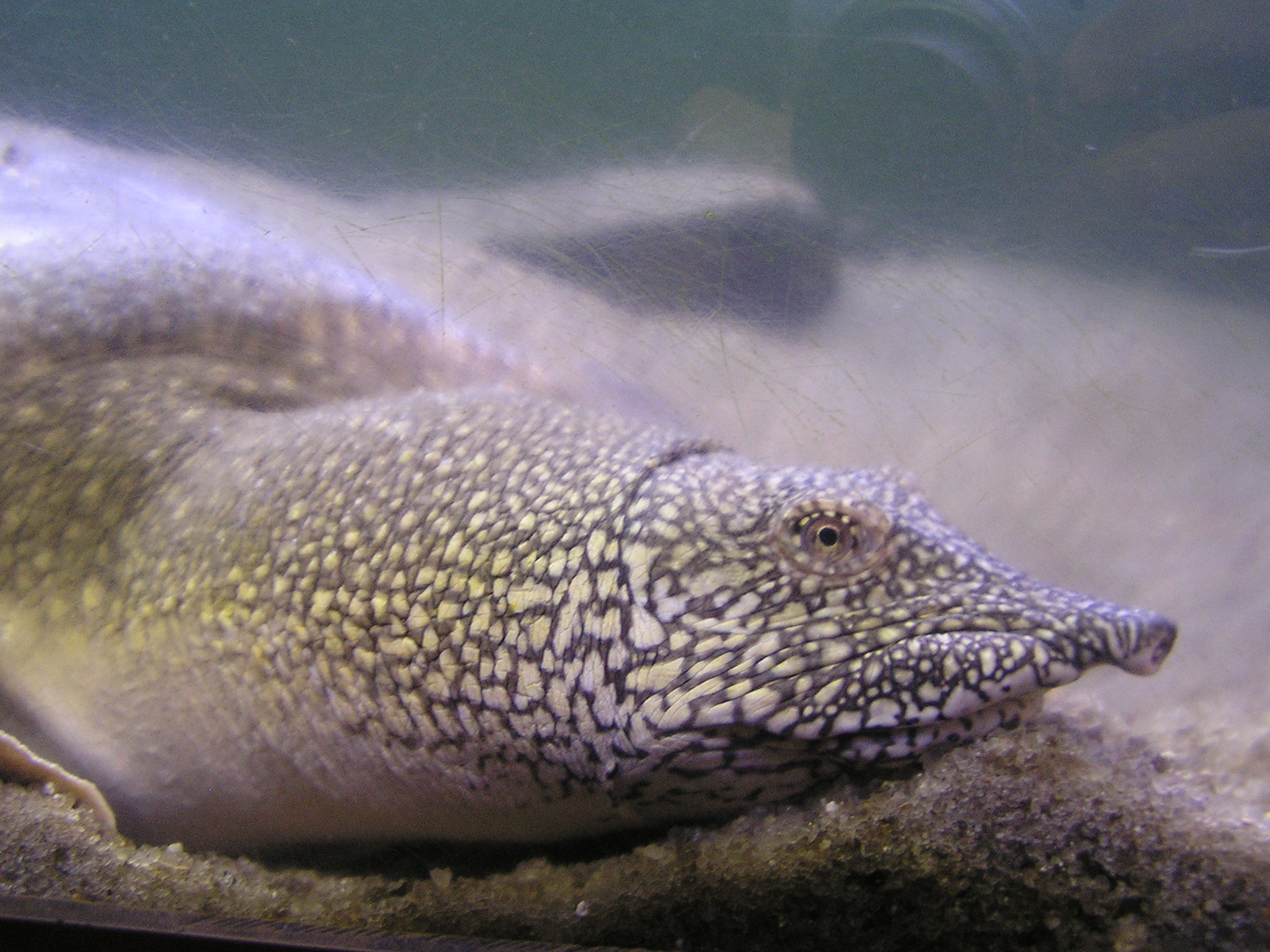 Нильский, или африканский трионикс (Trionyx triunguis) из семейства Трёхкоготные черепахи - Trionychidae